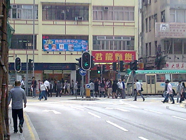 香港 黃大仙區 新蒲崗 大有街及爵祿街